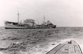 Der Versorger Nordmark der Kriegsmarine trifft ein U-Boot